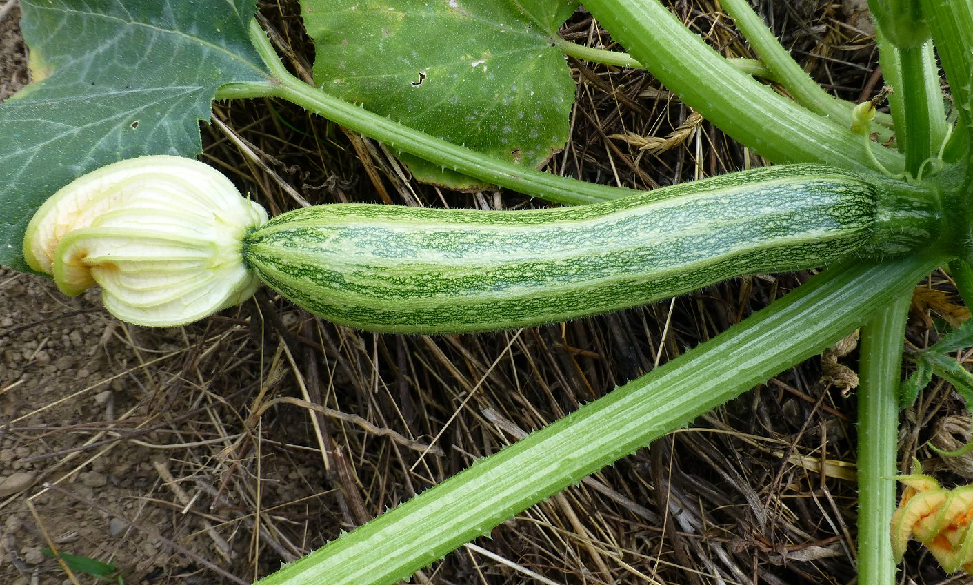 striato d'italia